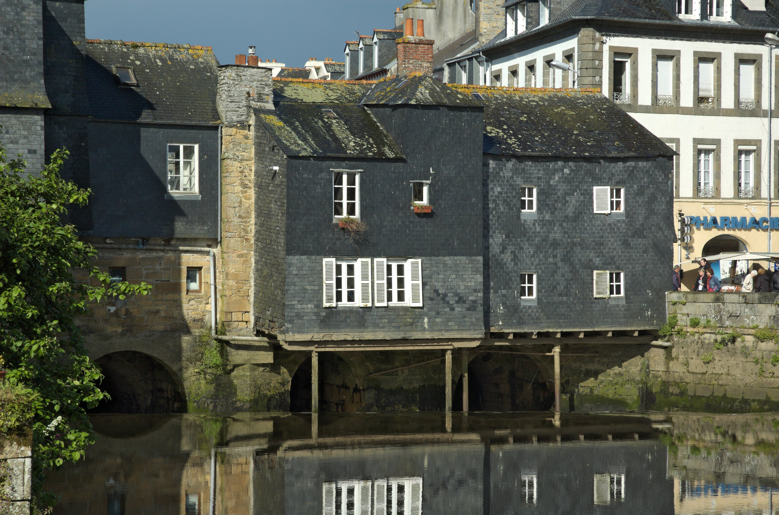 Pont de Rohan, the upstream side. Landerneau, Finistère, Bretagne, France